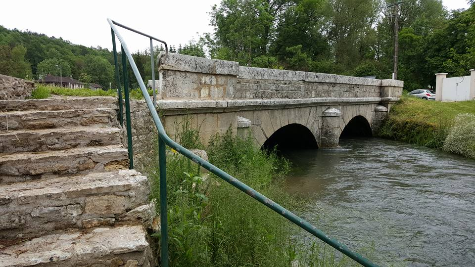 Pont de la Venelle traversant FONCEGRIVE